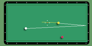 tiro biliardo candela